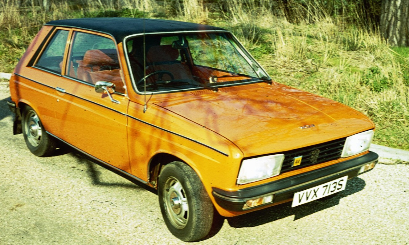 Peugeot 104ZS en Angleterre